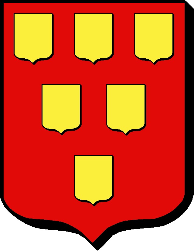 De gueules, à dix écus d'or 3, 2, 1.